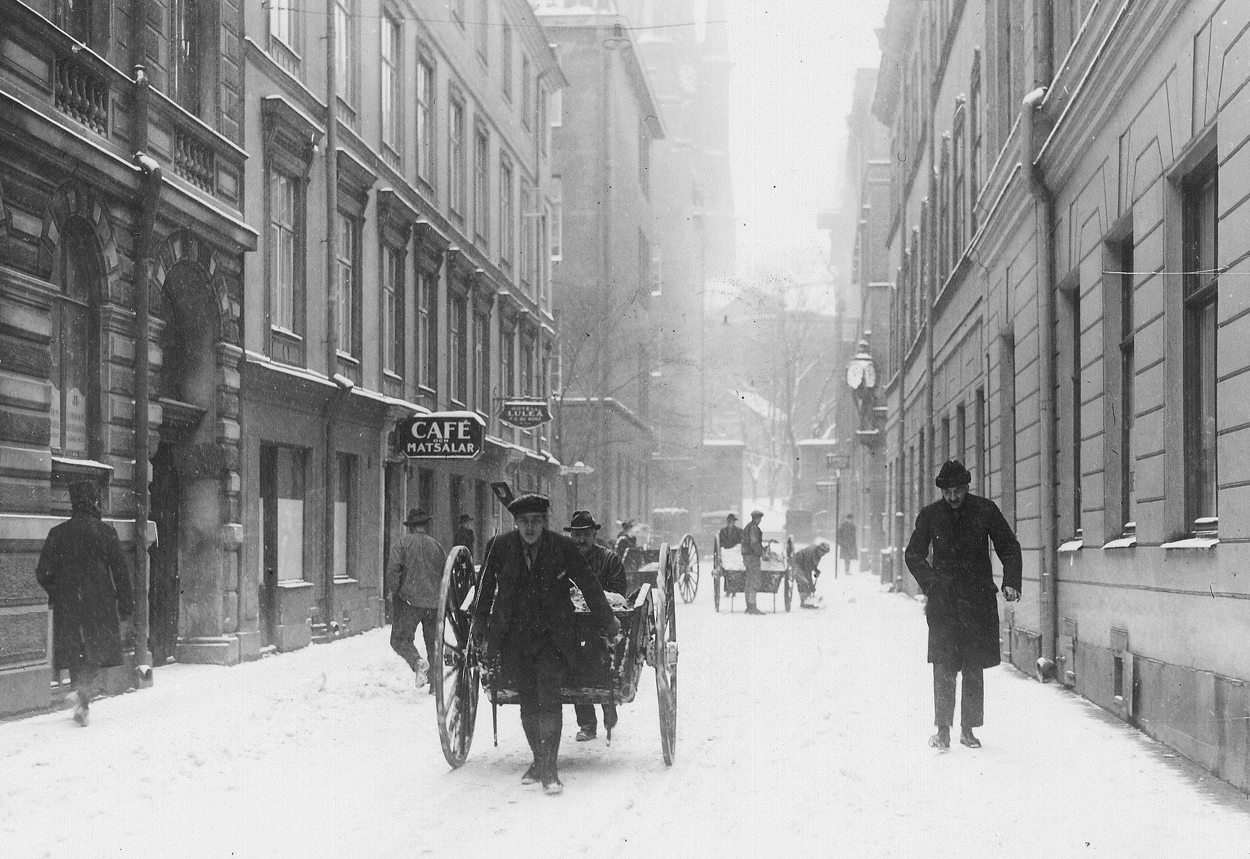 Klara södra kyrkogata mot norr